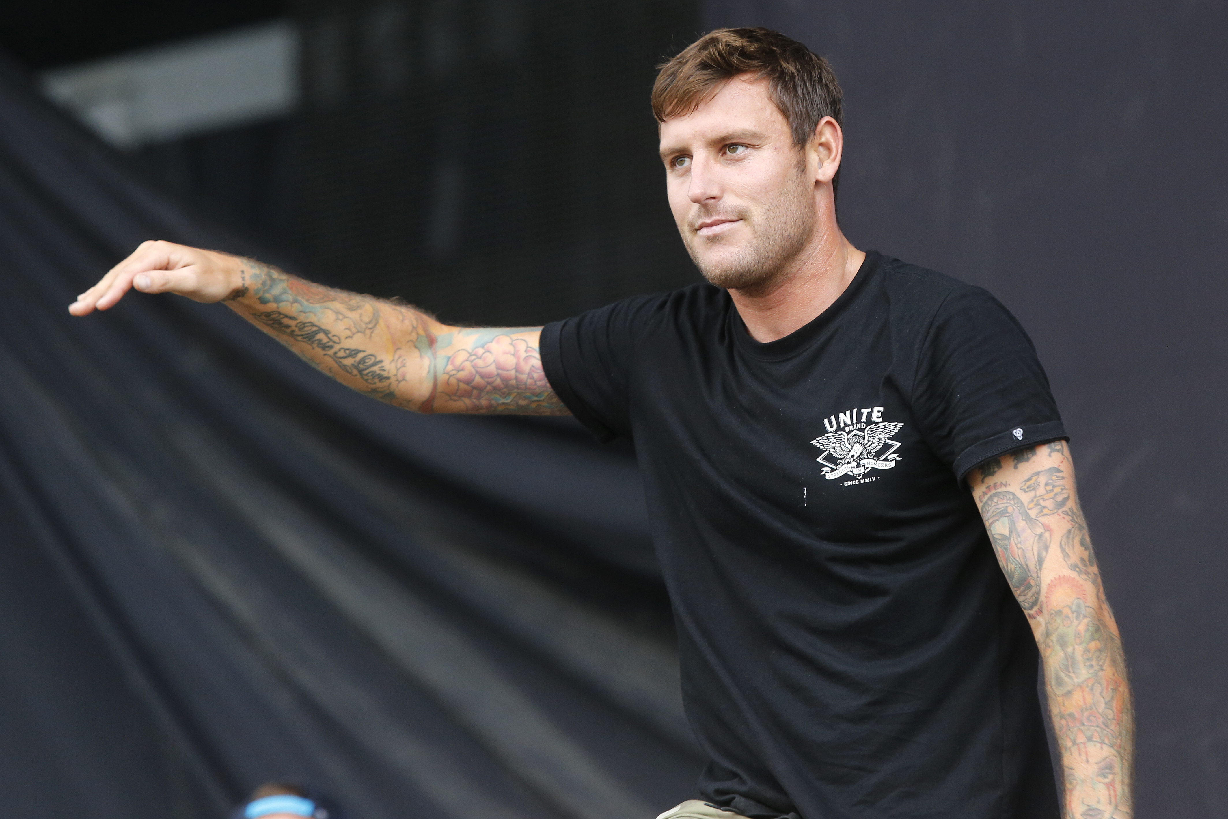 Winston McCall, Sänger der Band Parkway Drive beim Nova Rock-Festival 2013 bei Nickelsdorf (Österreich).